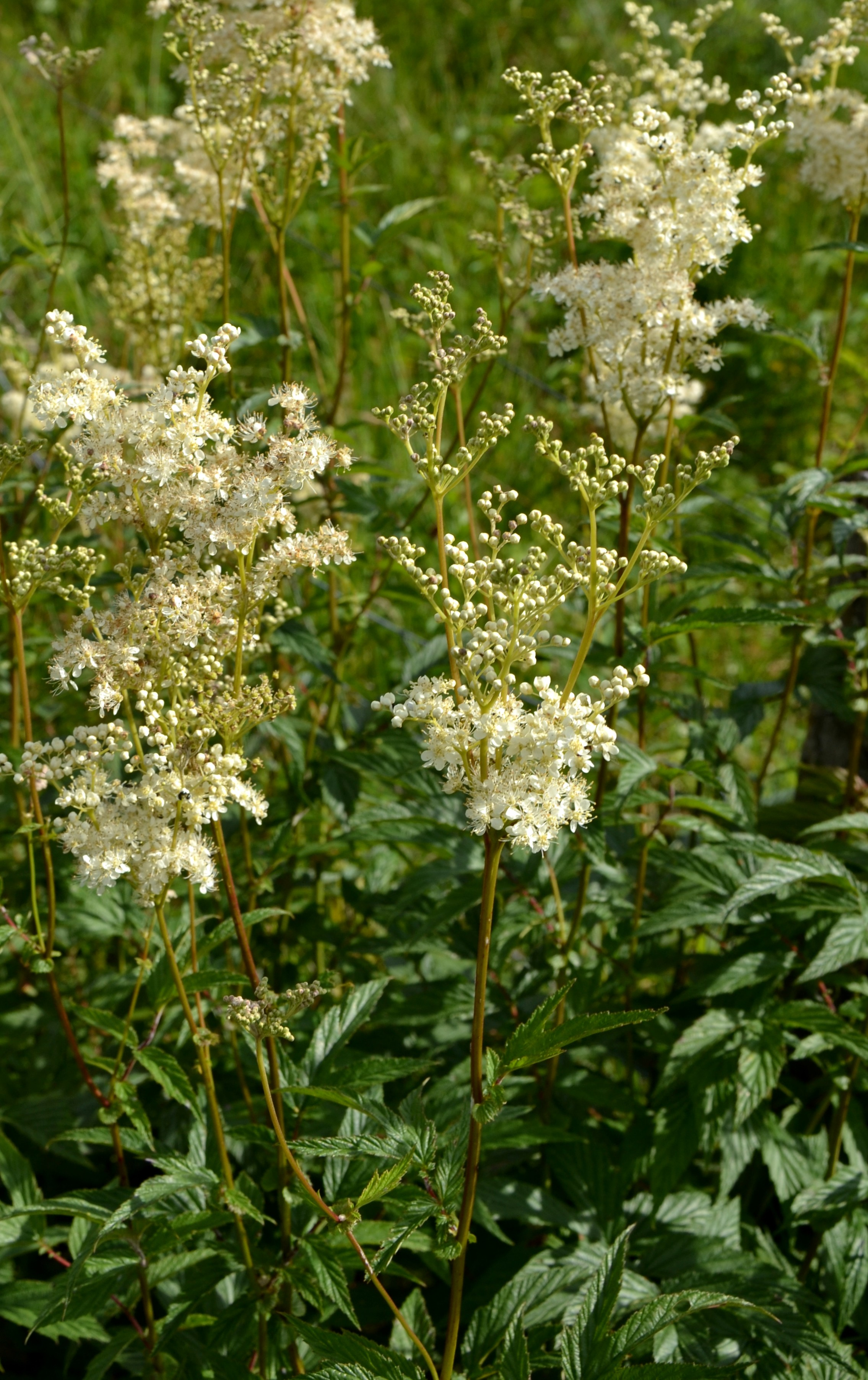 Reine des prés (Filipendula ulmaria), Le Tholy, Vosges